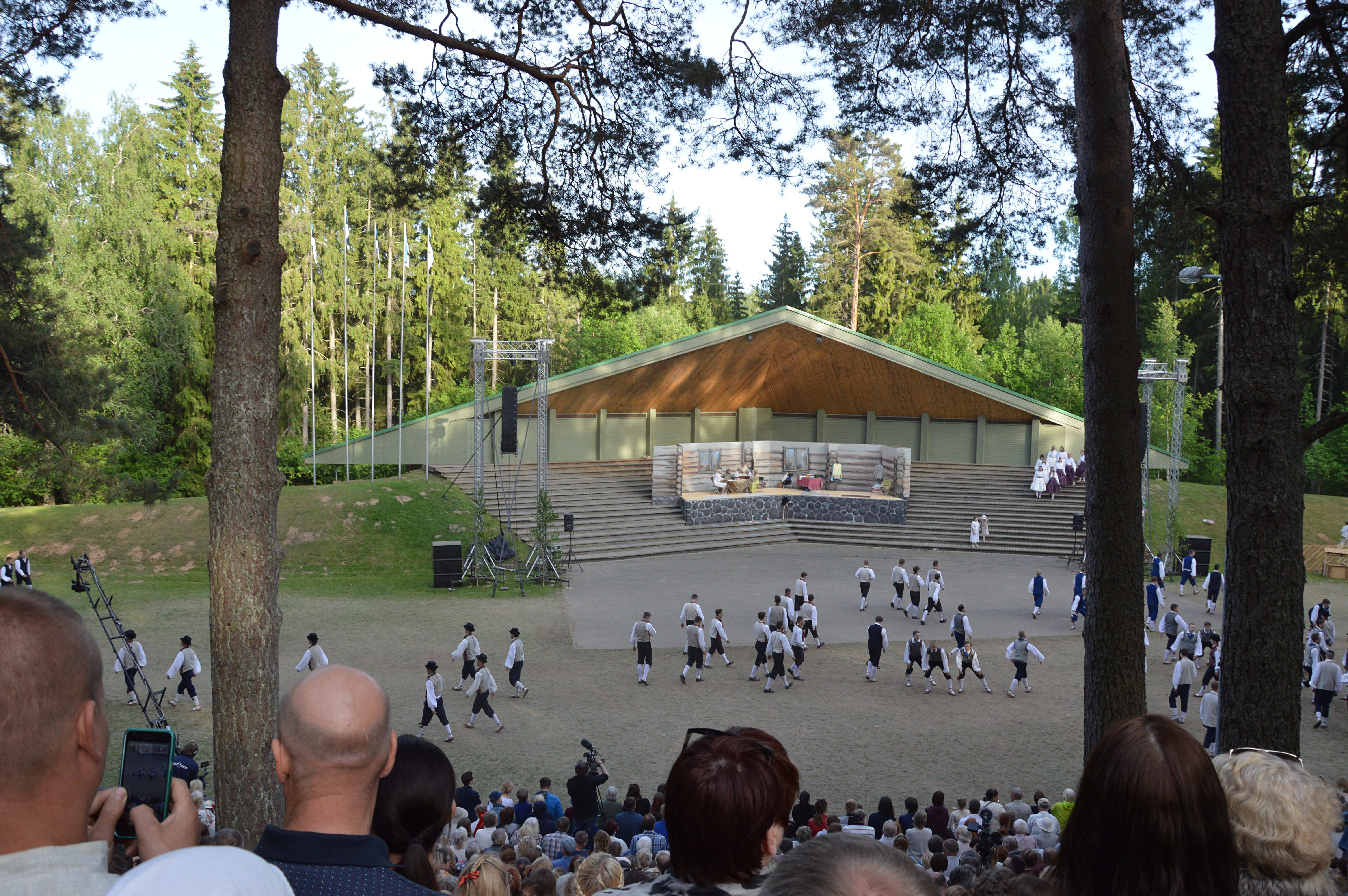 III Kagu-Eesti tantsupidu